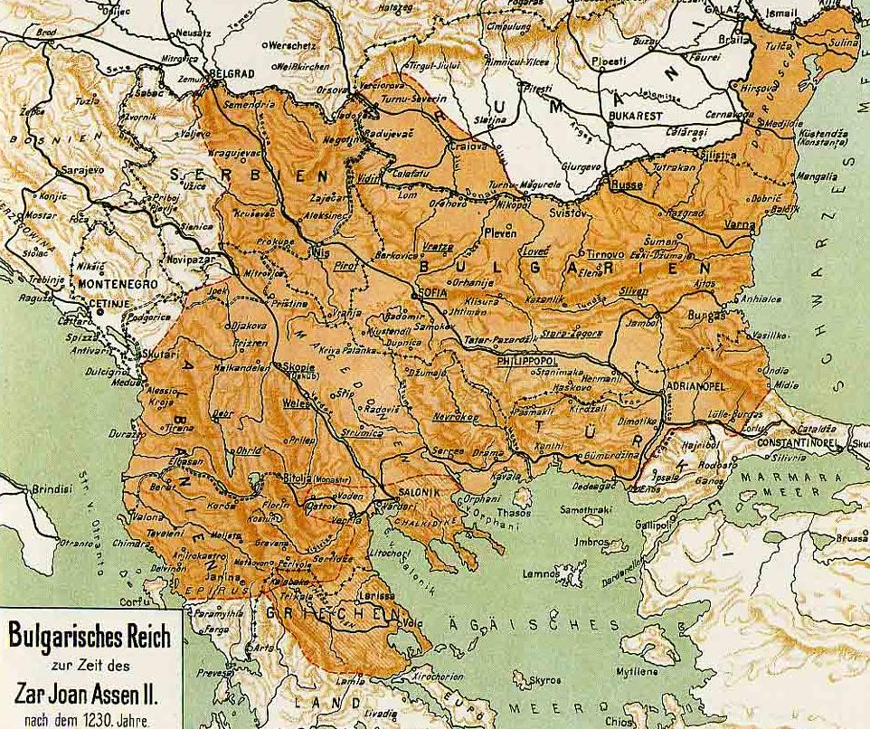 Границите на България по времето на цар Иван Асен II след битката при Клокотница (1230 г.)